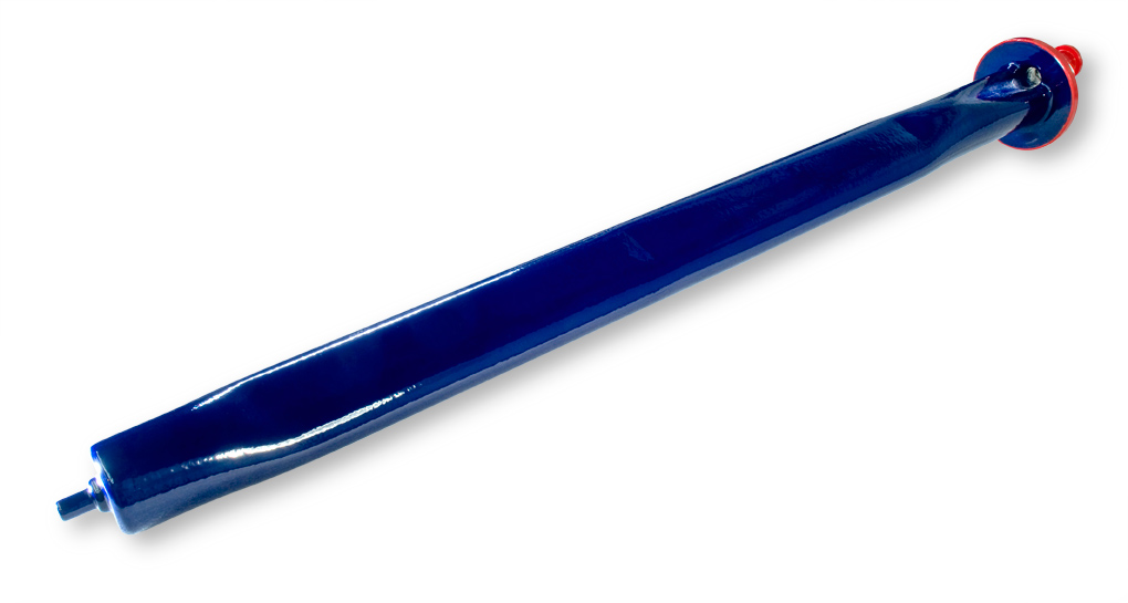 Stromstörer für emaillierte Apparate